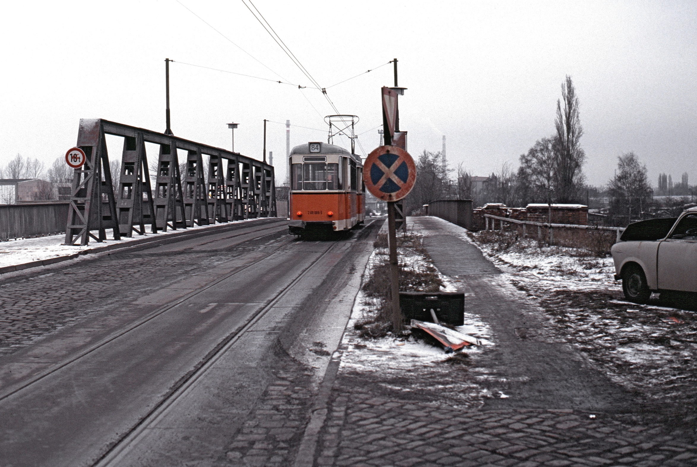 Berlin Altglienicker Brücke